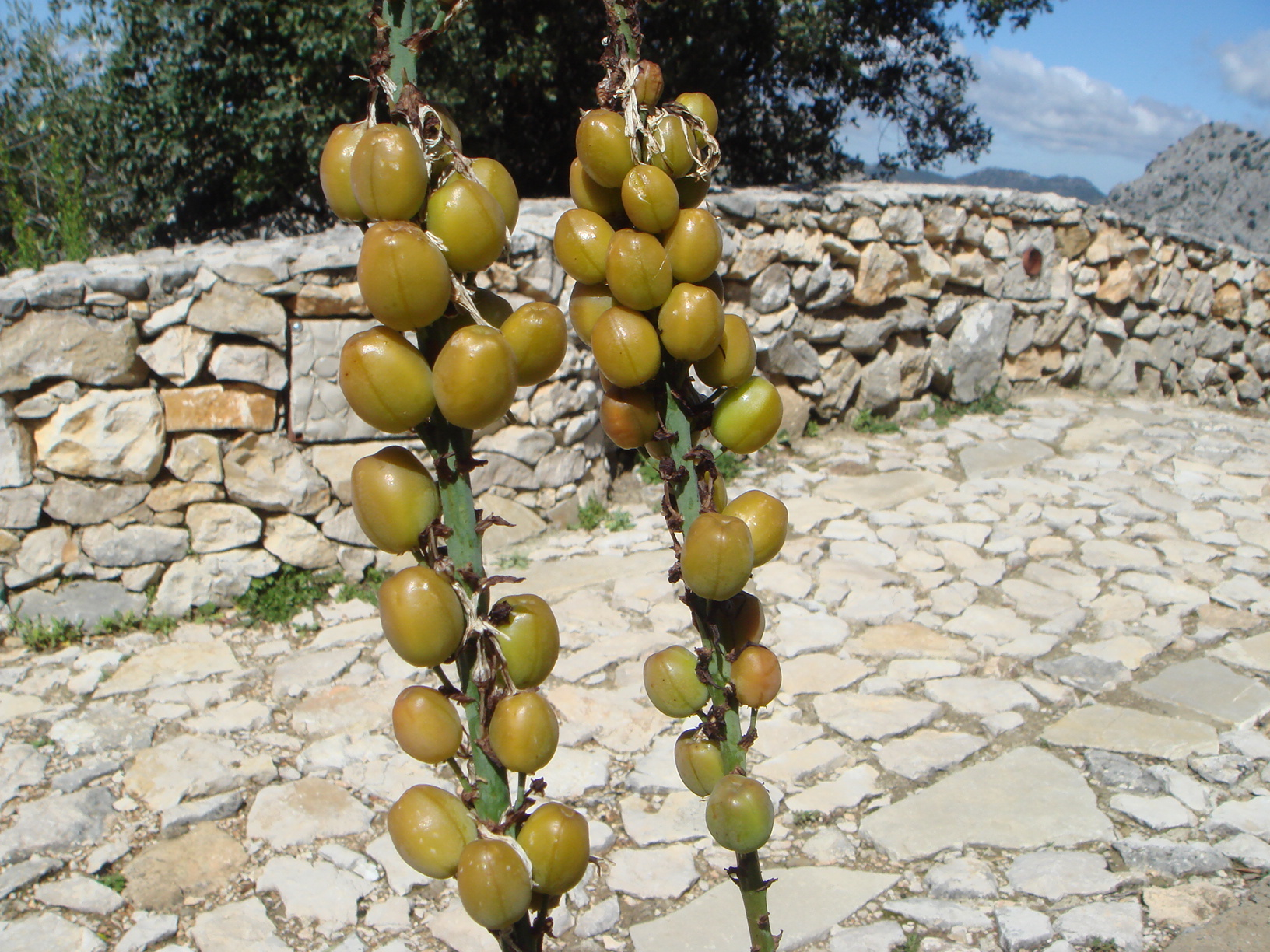 Asphodelus ramosus, Benaocaz, Cádiz, España